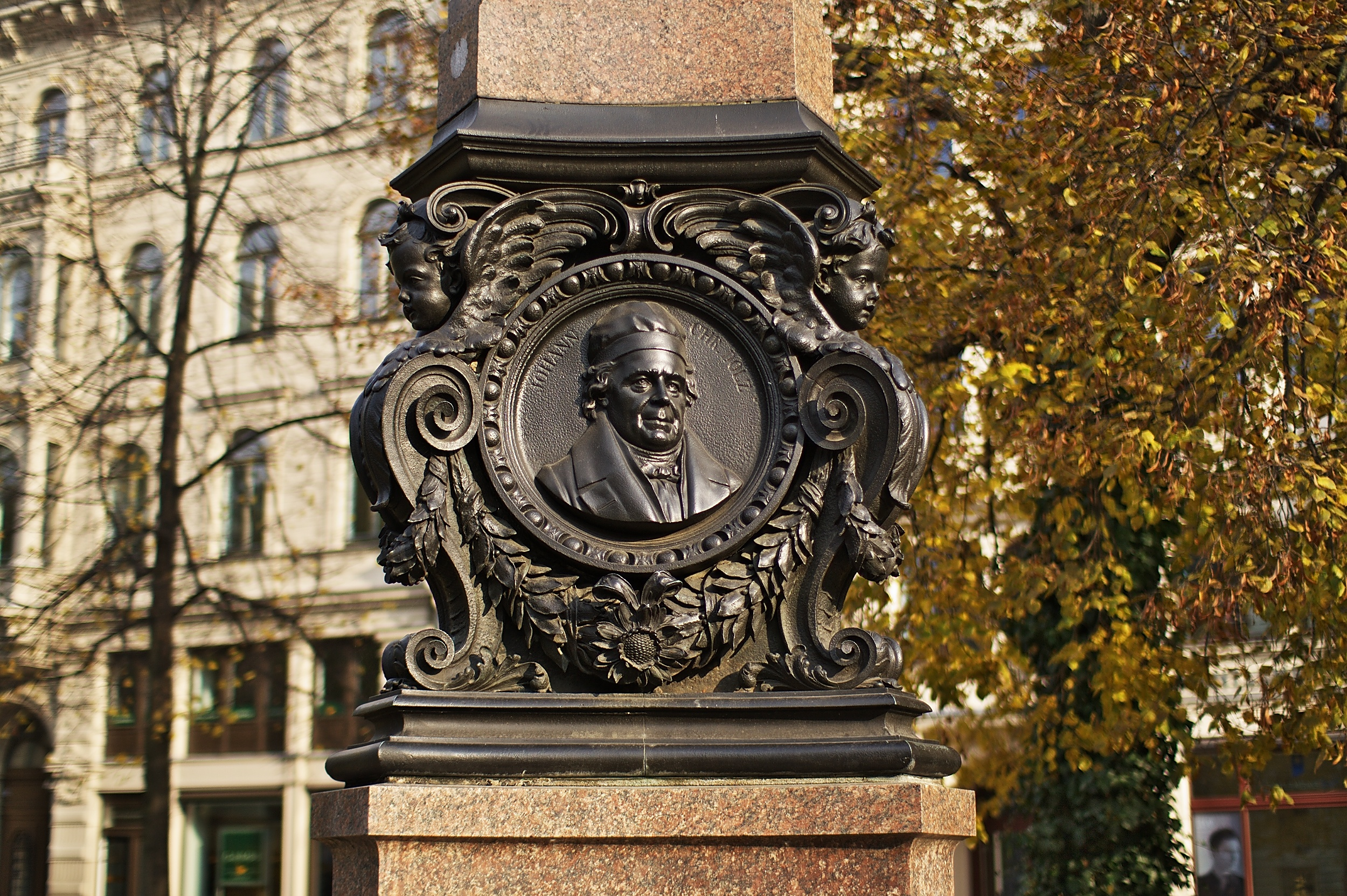 Detailansicht des Johann-Christian-Dolz-Denkmals am Dittrichring in Leipzig